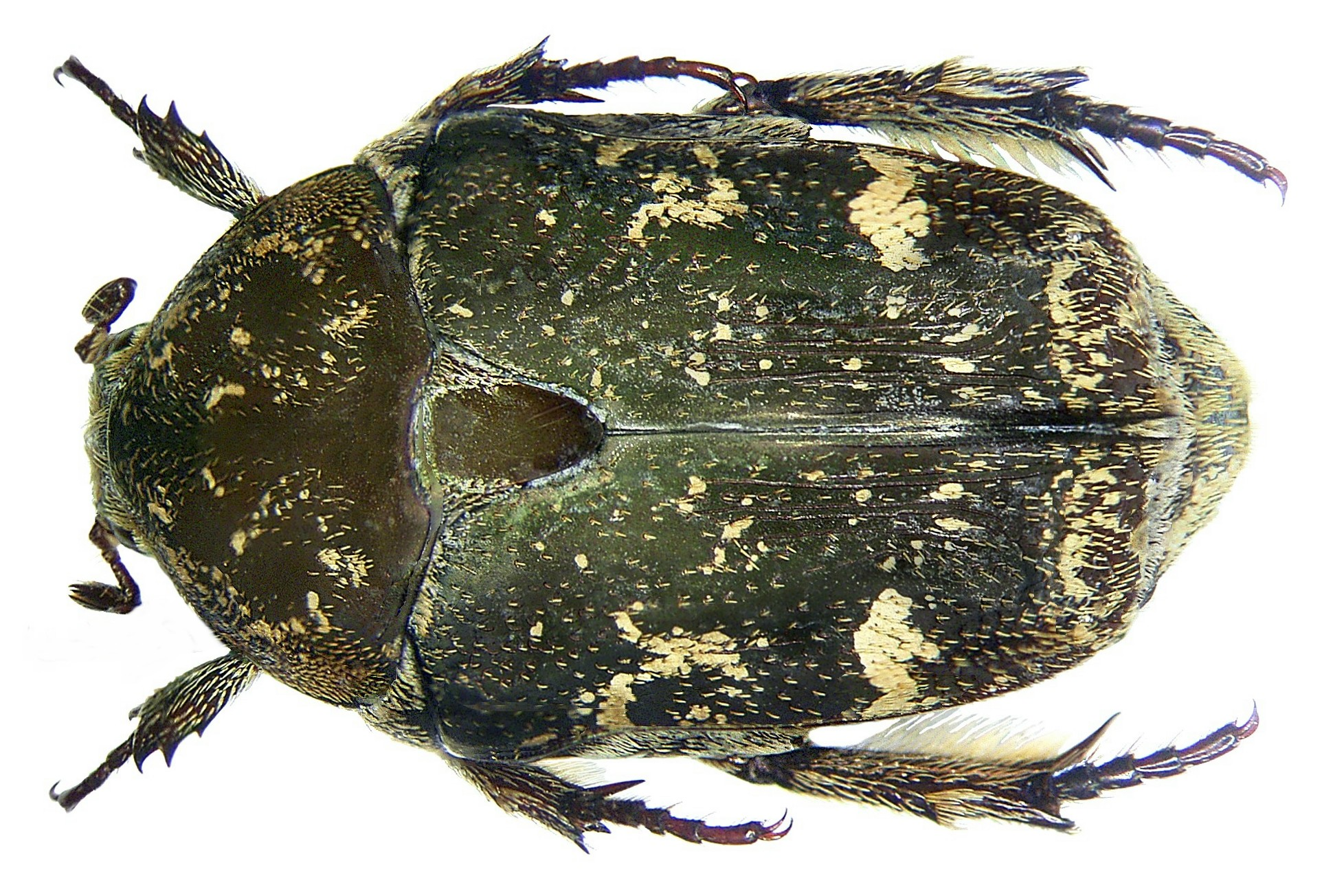 Familie: Scarabaeidae Grösse: 12-17,2 mm Verbreitung: Japan, Okinawa, Miyako Isl., Irabu-Jima Isl.; West-Papua Fundort: Indonesien, Irian Jaya, Ransiki leg.det. A.Skale, 2007 Foto: U.Schmidt, 2007